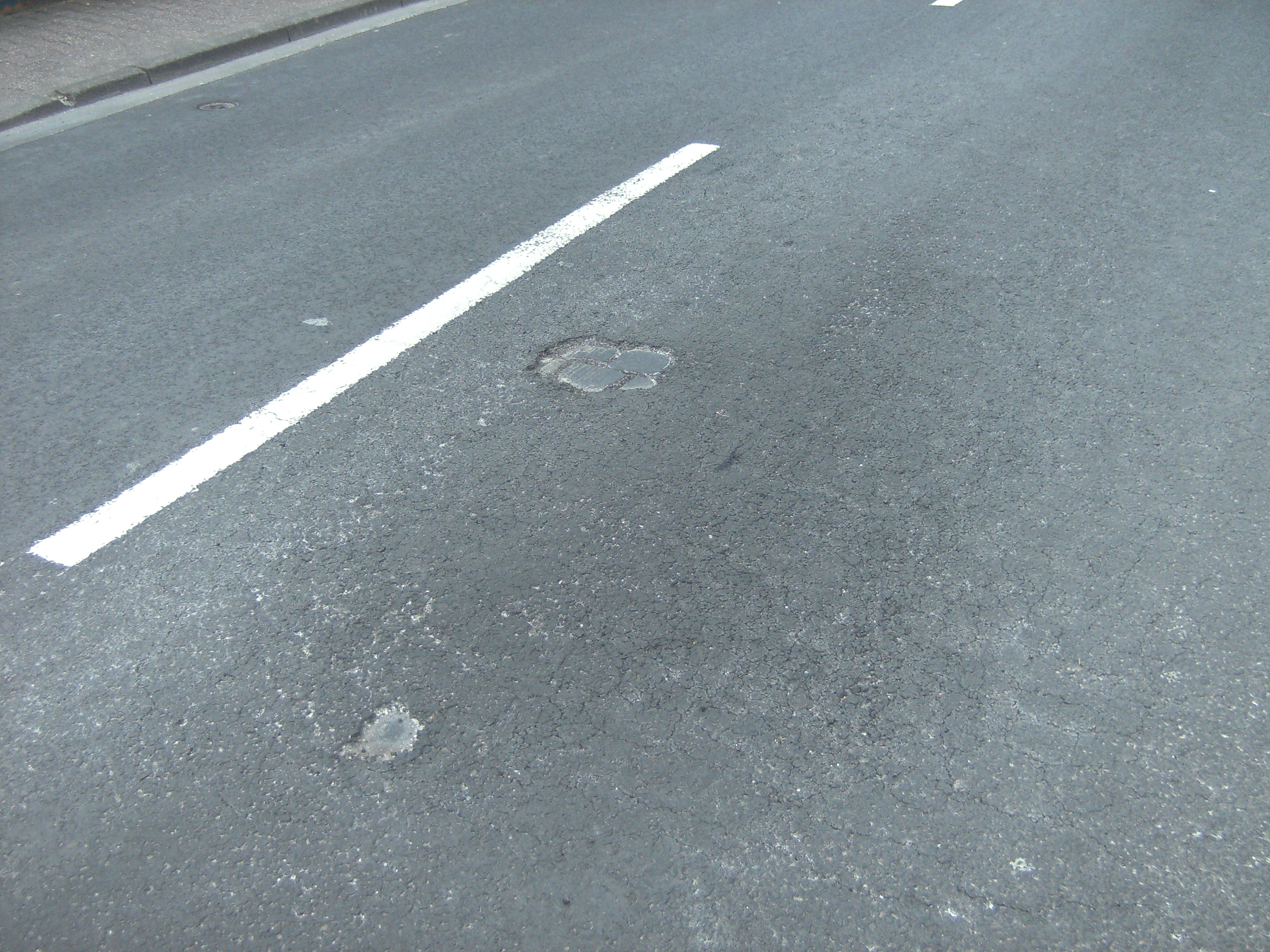 Kopfsteinpflaster unter einer Teerschicht